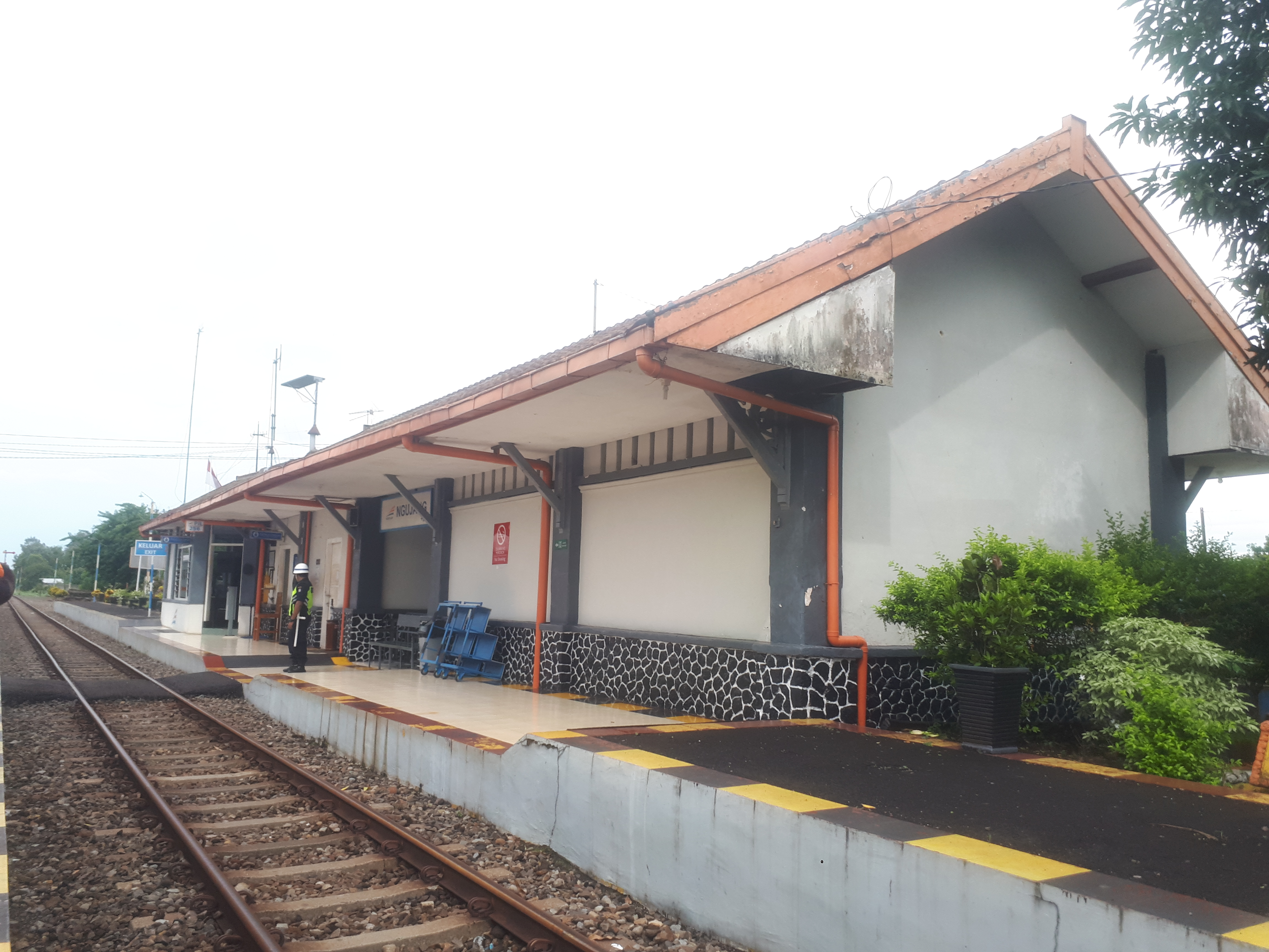 Stasiun Ngujang pada tahun 2020